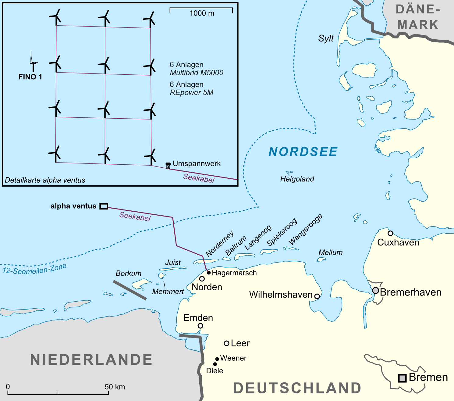 Lage und Detailkarte des Windparks alpha ventus (mit Umspannplattform und FINO 1) in der Nordsee